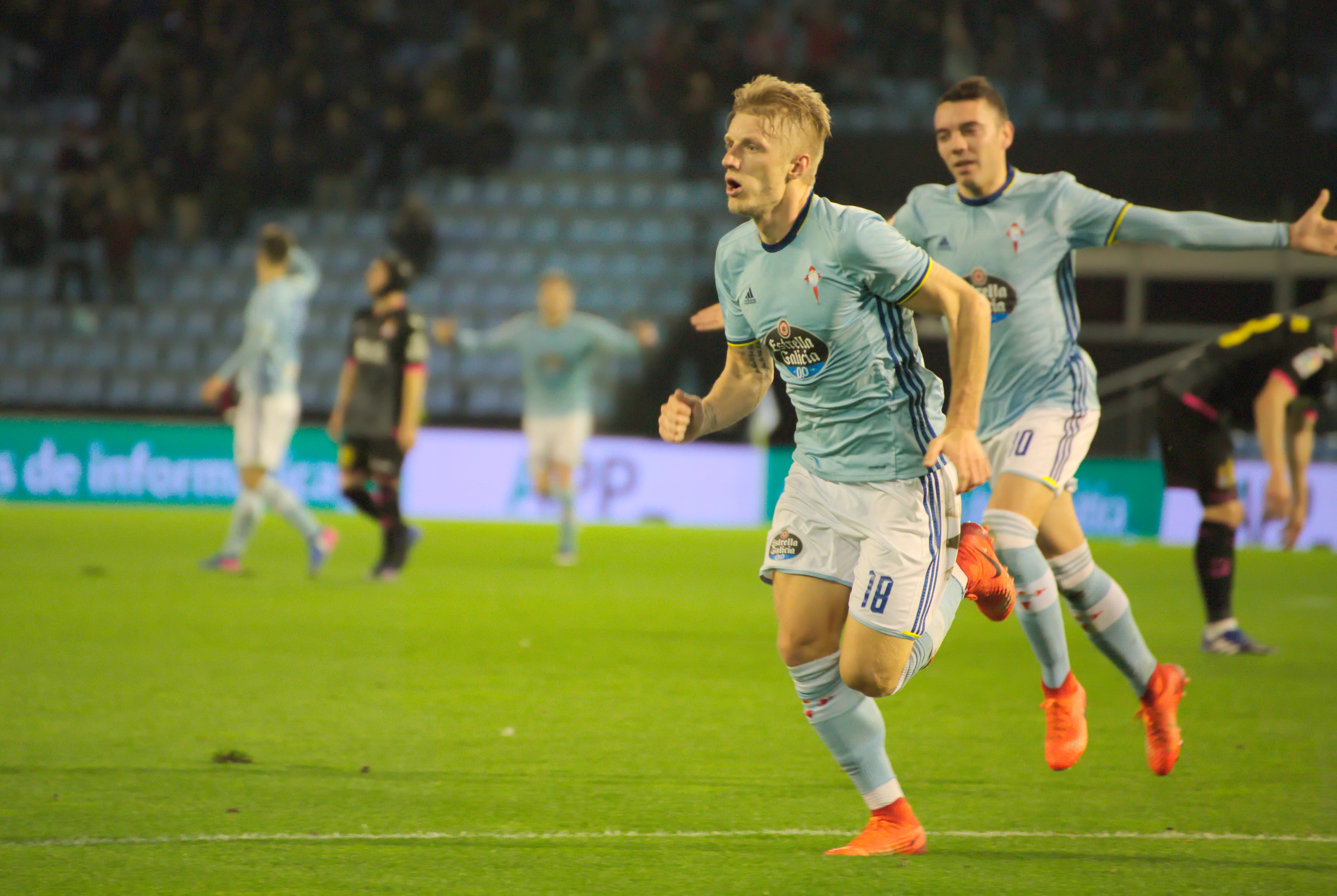 Daniel Wass - RC Celta de Vigo